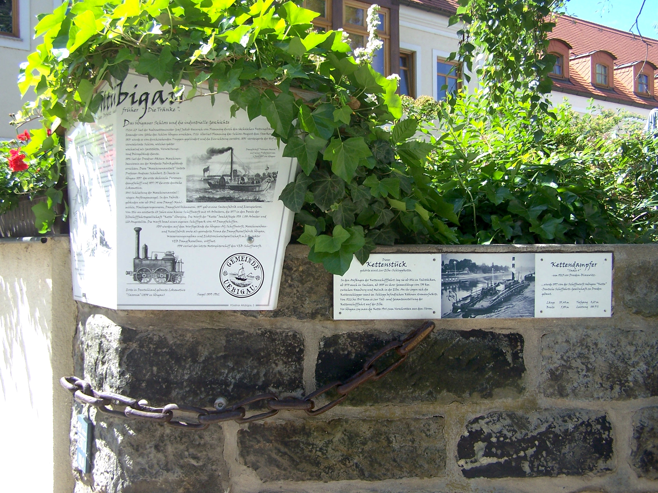 Informationstafeln in Altübigau zur Geschichte Übigaus sowie zur Kettenschifffahrt auf der Elbe, darunter ein originales Kettenstück